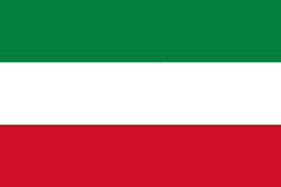 Bandera de Mocha